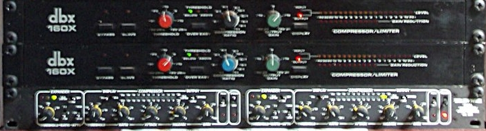 selbst fotografiert